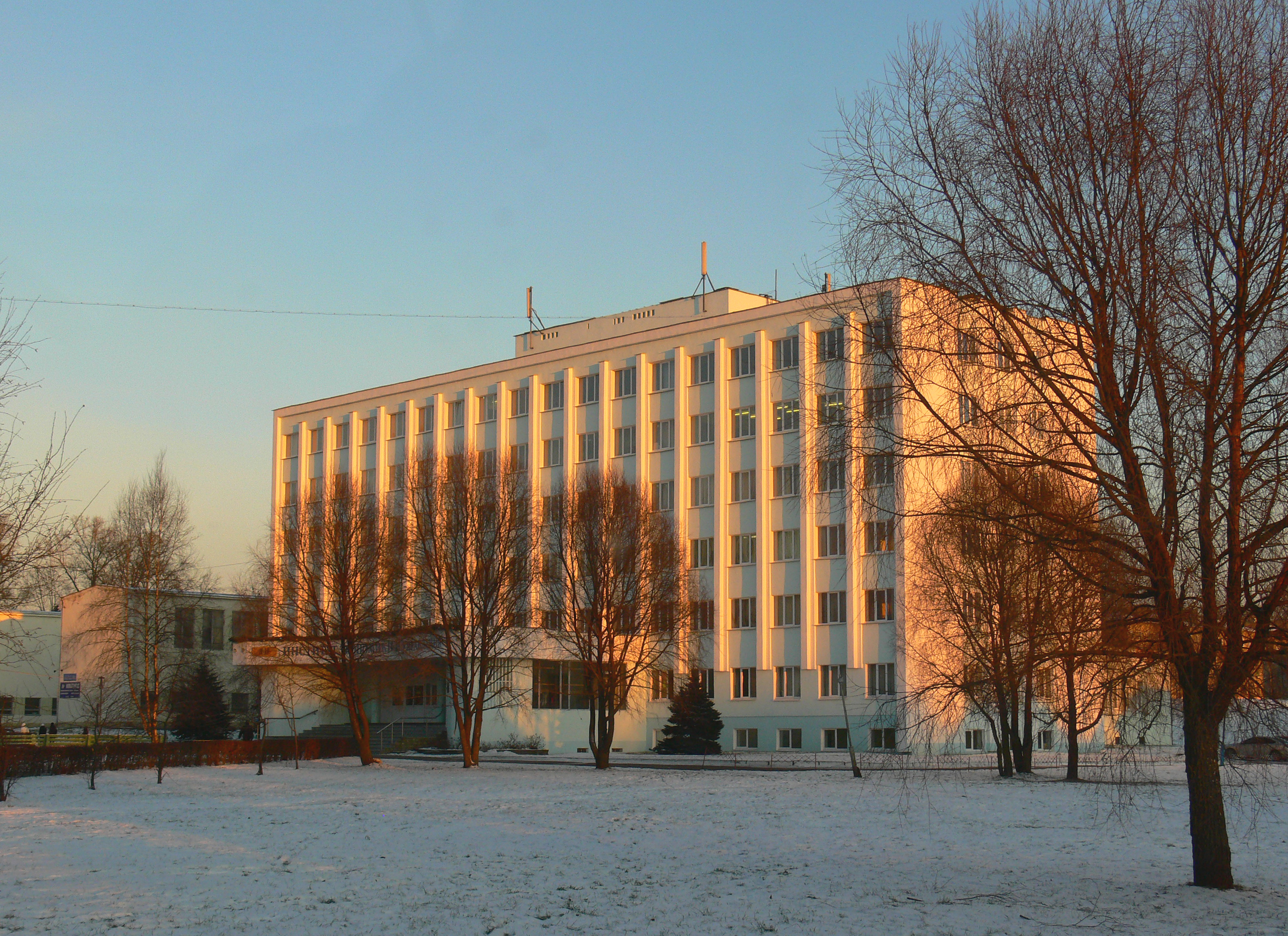 Здание Института экономики и управления. Великий Новгород